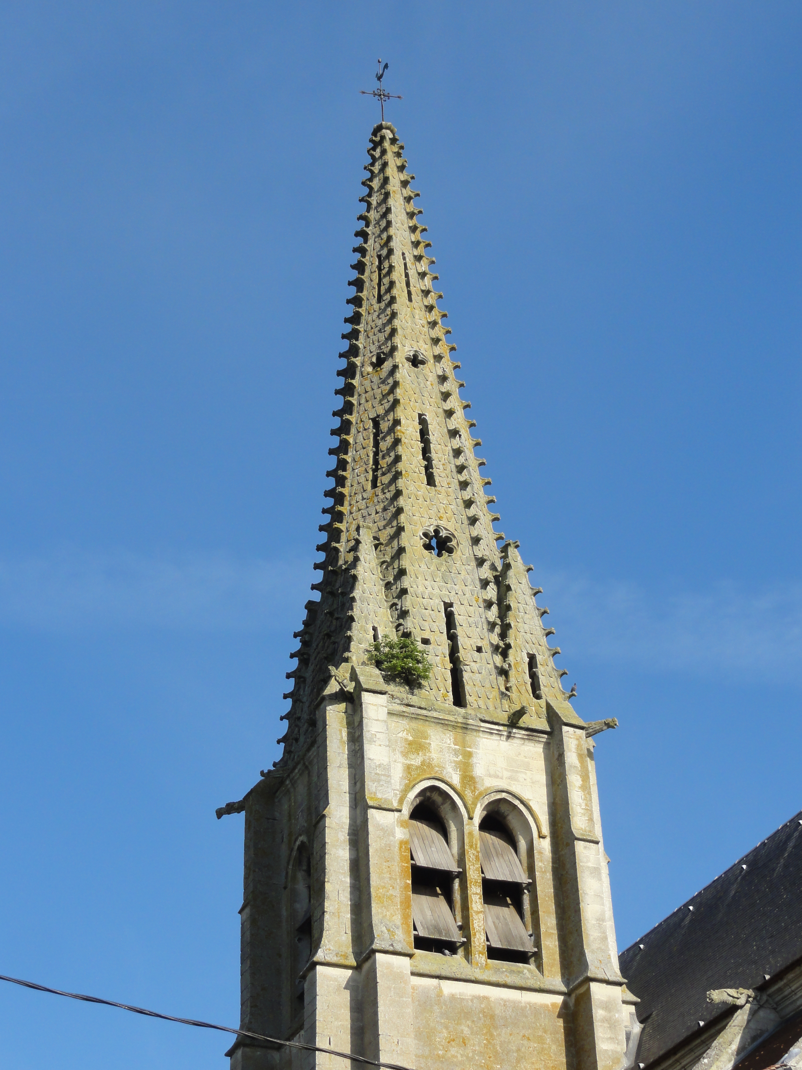 Église Saint-Martin de Versigny (voir titre).